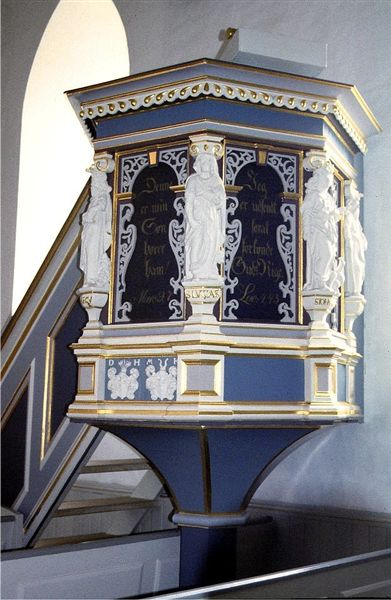 Hårlev Kirke i Danmark. Prædikestol